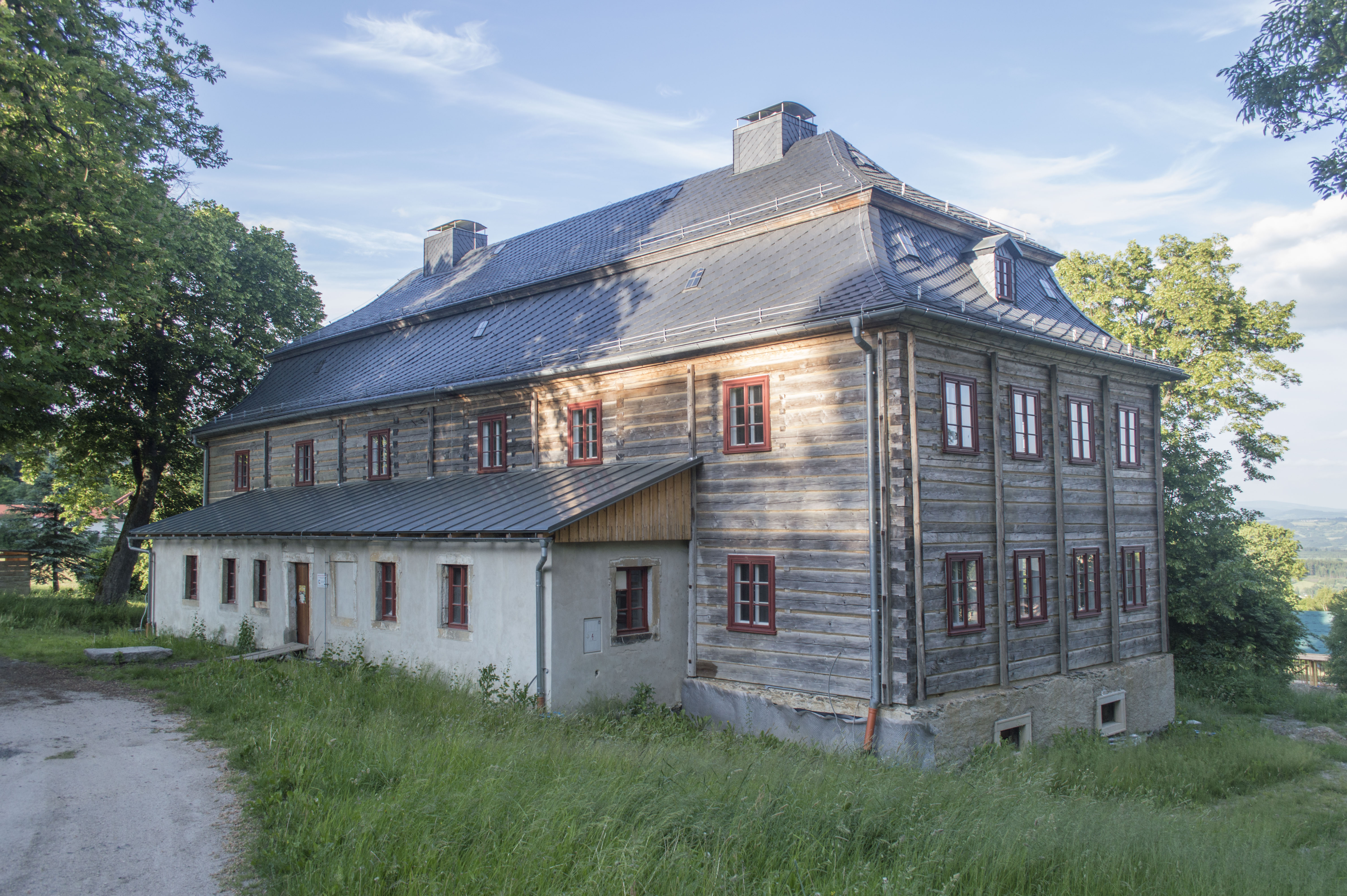 Krásná, součást obce Jistebsko (Pěnčín). Kittelův burk.